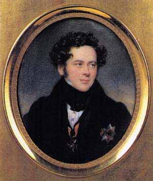 Antony Pogorelsky (1787-1836)